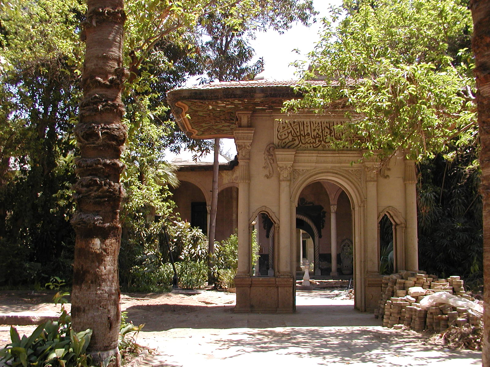 Jardin du Palais Al-Manyal, (Le Caire, Égypte).